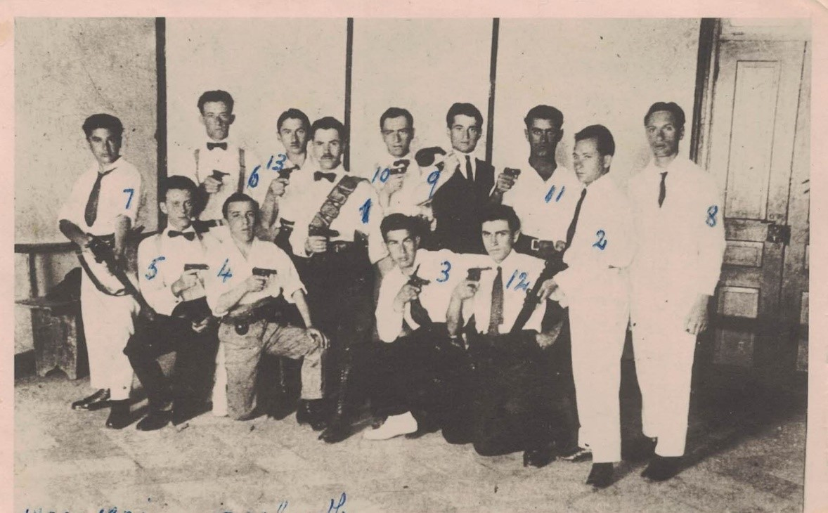 קבוצת קדם קבוצת הקומנדו של קדם משנת 1921 בתל אביב